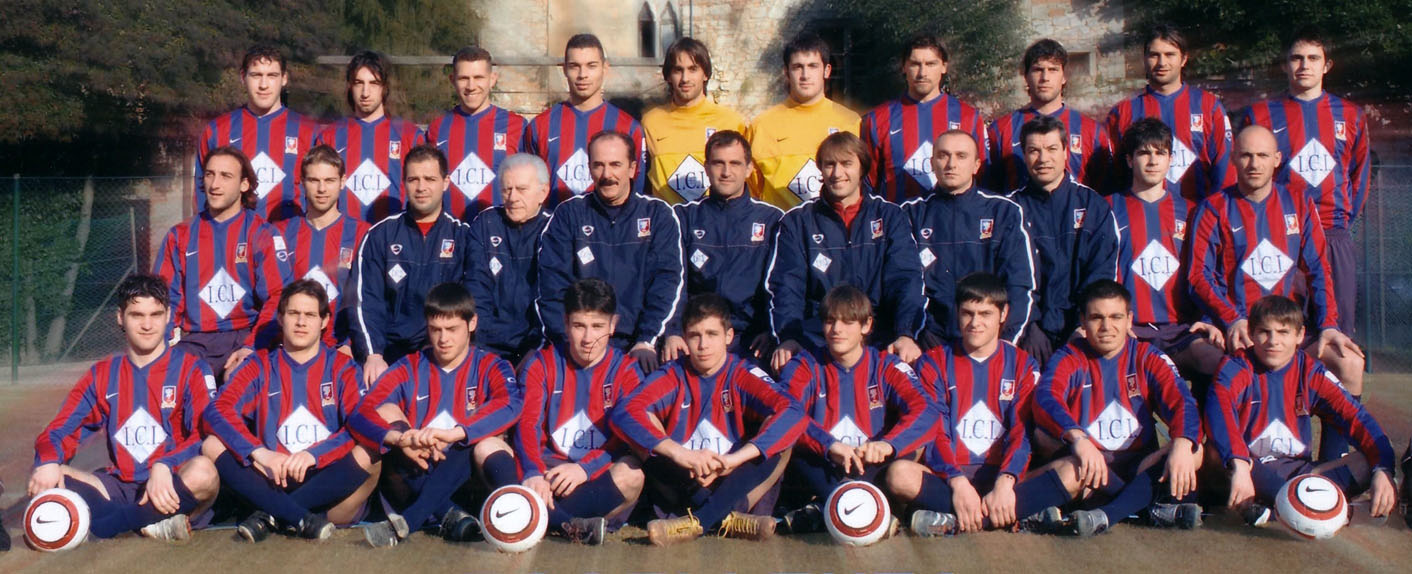 La Narnese vincitrice del campionato di Eccellenza Regionale e della Coppa Italia regionale 2004-05. Promossa in serie D - In alto da sin.: Quondam G., Brozzetti, Tassone, Rosati, Pelliccio, Taddei, Marrocolo, Proietti, Botta, Piccini. Al centro da sin.: Faiola, Piovanello, Ciotti (mass.), Roscini (mass.), Campanella (prep. atl.), Schenardi, Lilli (all. in 2°), Vallerignani (osserv.), Bernardini (mass.), Raggi, Cioci.In basso da sin.: Biagetti, Menichelli, M.Grillini, Maccaglia, Angeli, Rossi, S.Grillini, Pestrin, Silveri.